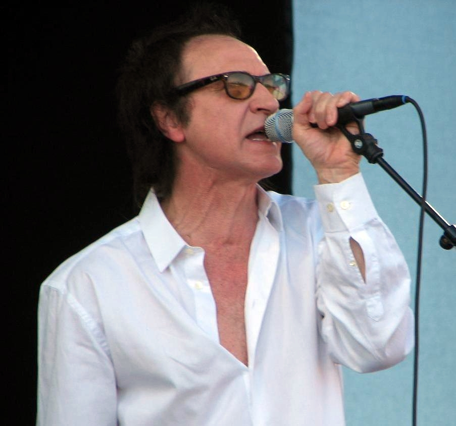 Ray Davies playing in Lichtenvoorde (nl) june 10, 2006